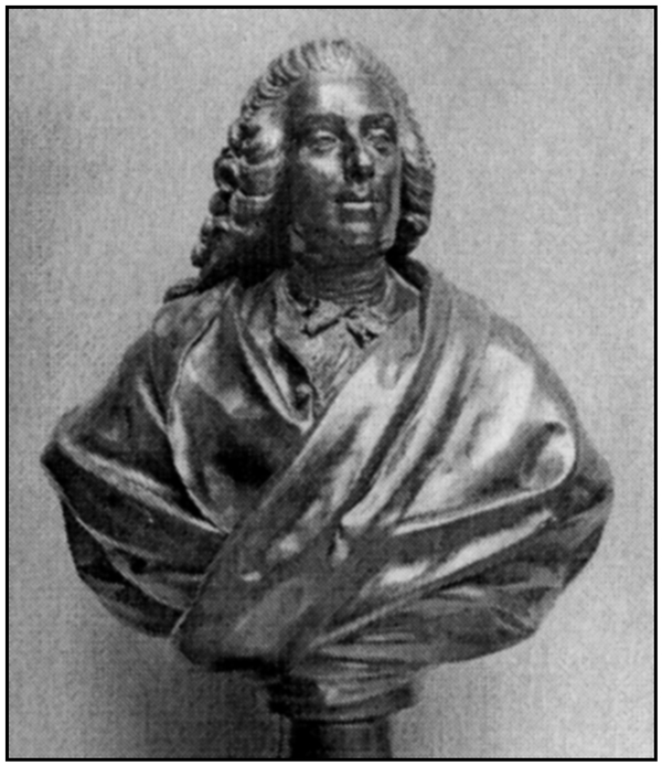 Jean François Ogier french diplomat and scientist